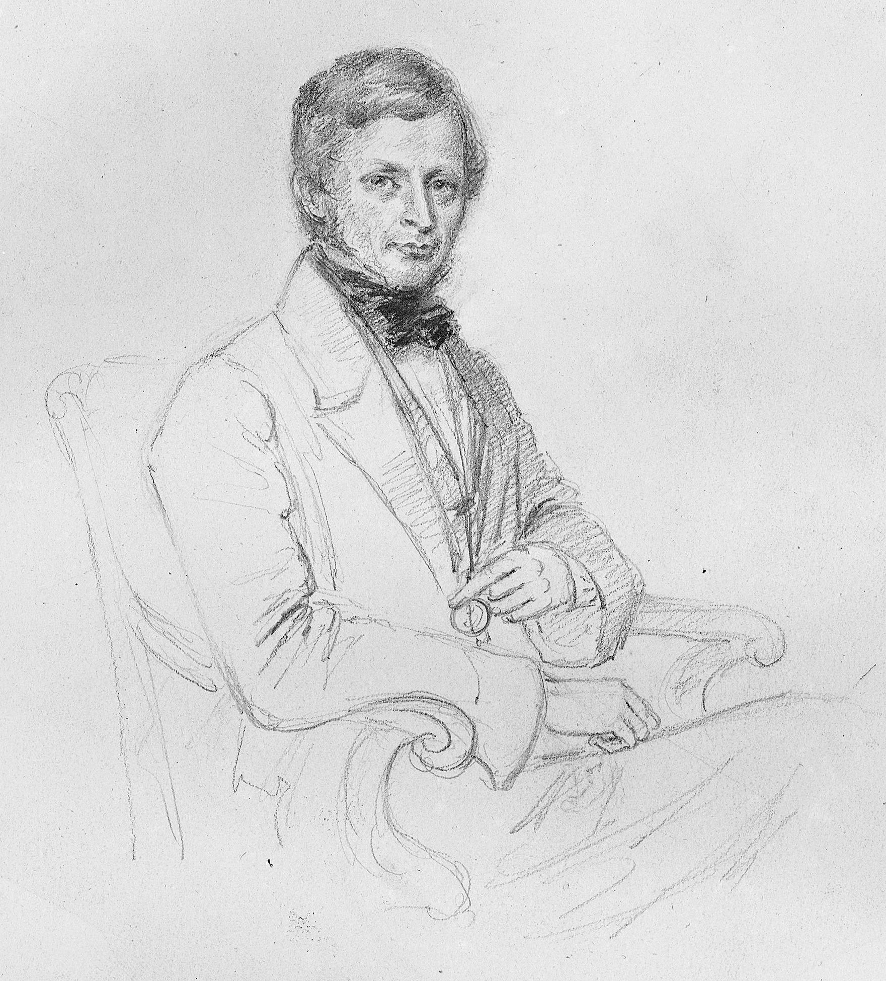 Gustaf Hjort (1818-1876)